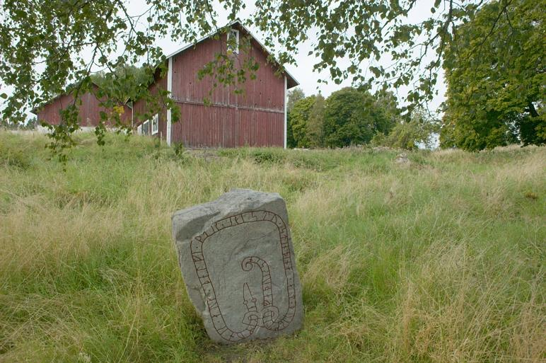 Inskriften lyder: Ingemund och Tjälve de reste denna sten efter Torkel, sin fader. Motiv: Sö194 Brösicke Nyckelord: Runor Kategori: Runristning/runsten Inskriften lyder: Ingemund och Tjälve de reste denna sten efter Torkel, sin fader.